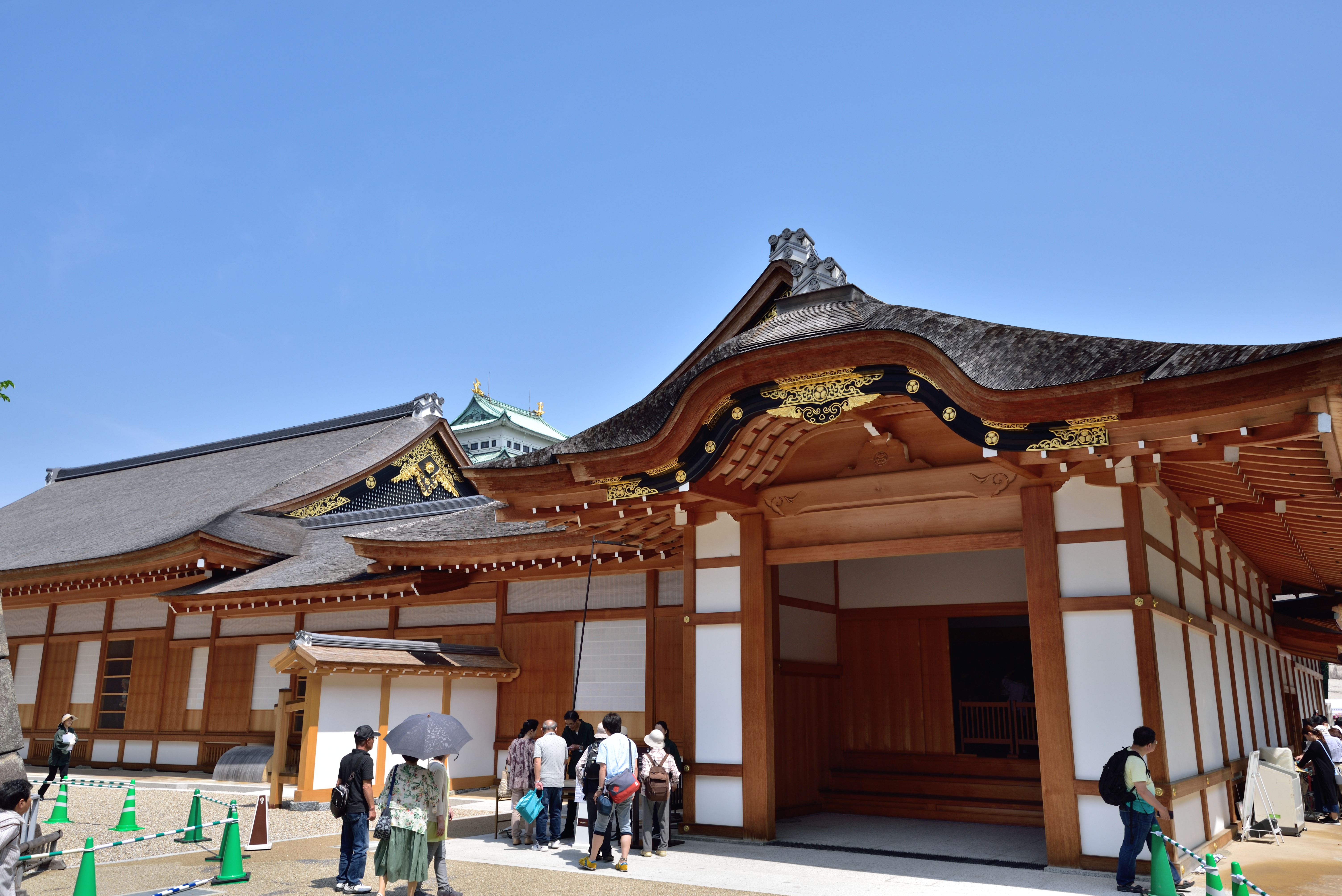 本丸御殿車寄せ